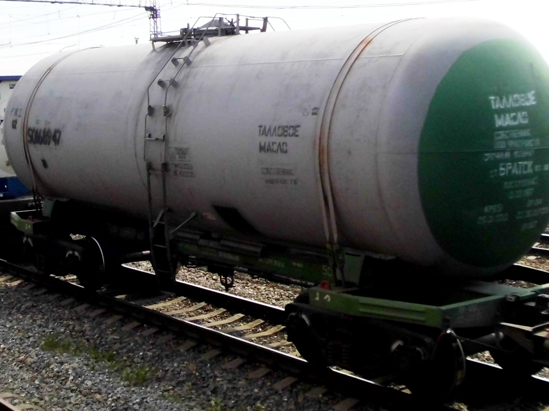 4-х осный вагон-цистерна для таллового масла. Россия.